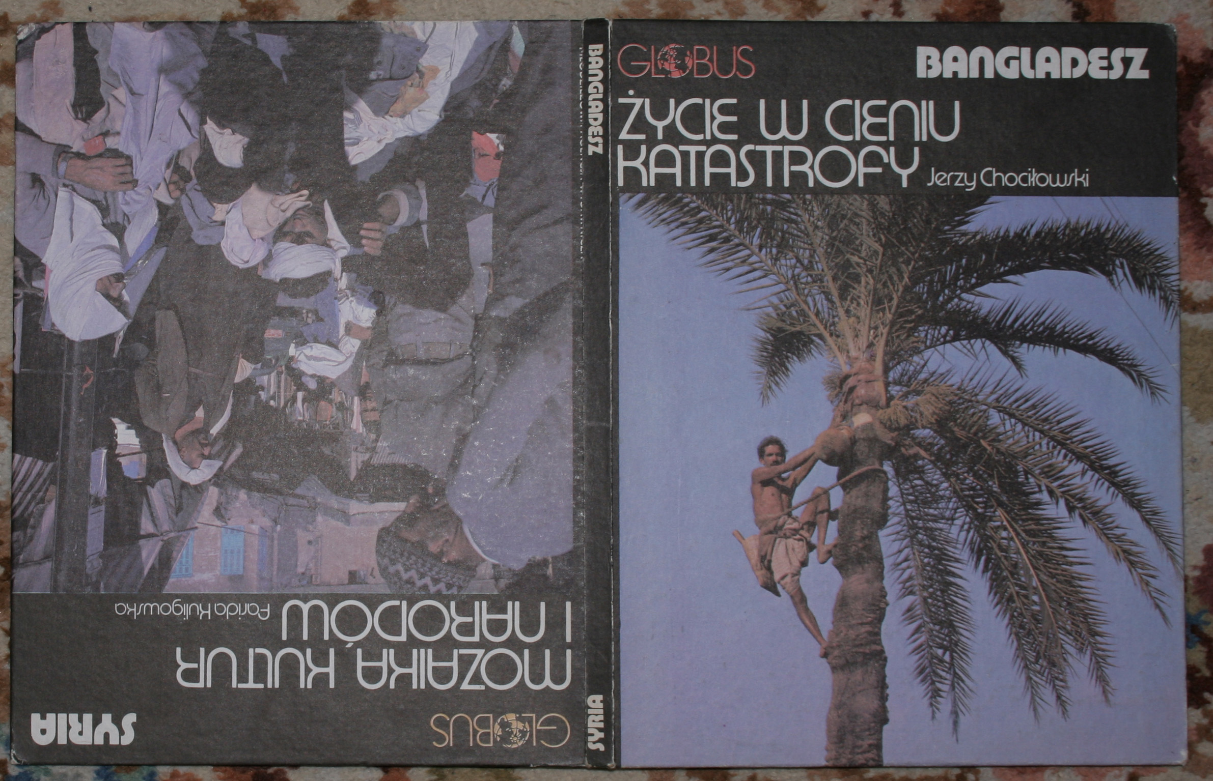 Pierwszy tom serii wydawniczej "Globus"